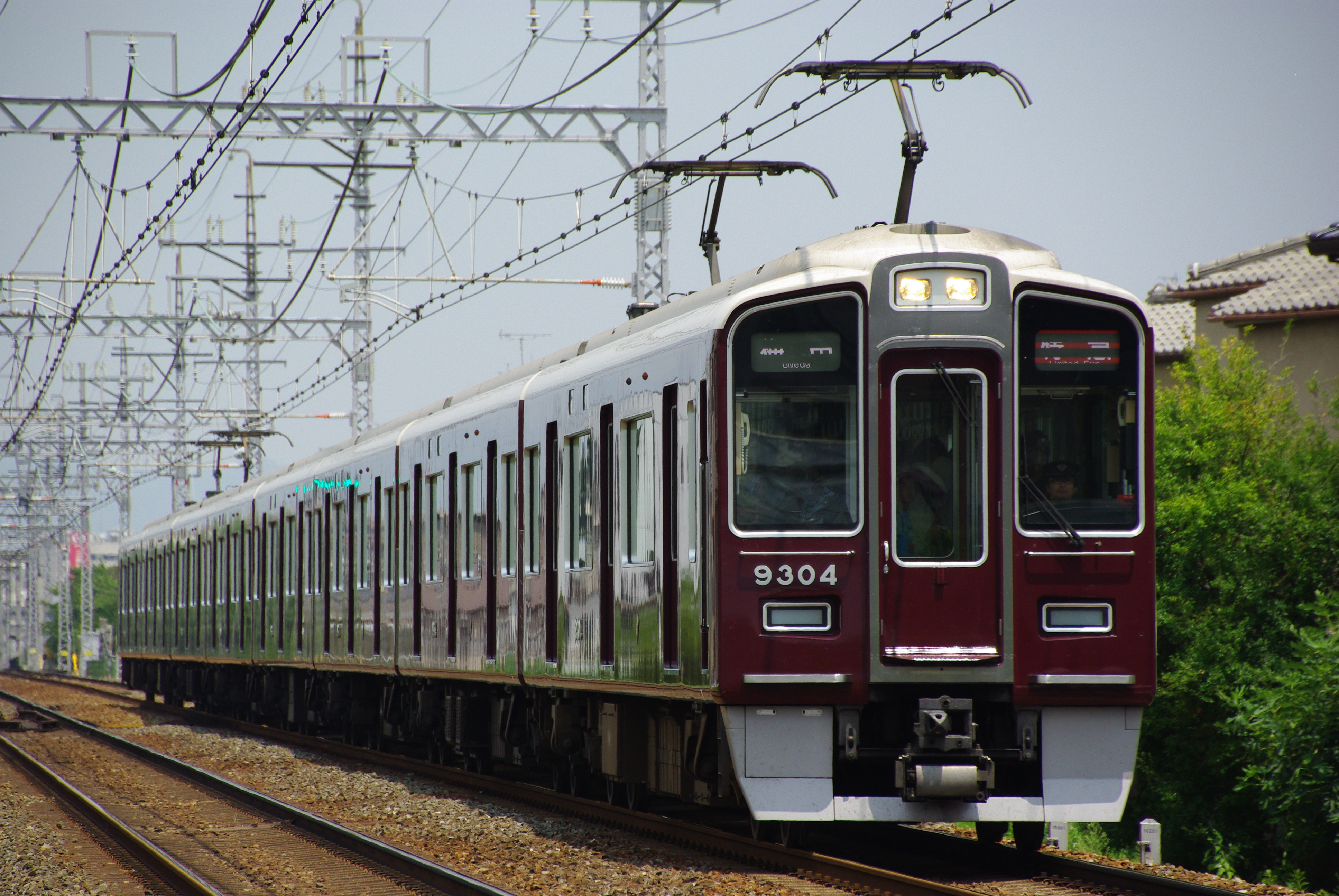 南茨木駅付近の踏切にて。大阪梅田方面行き列車。